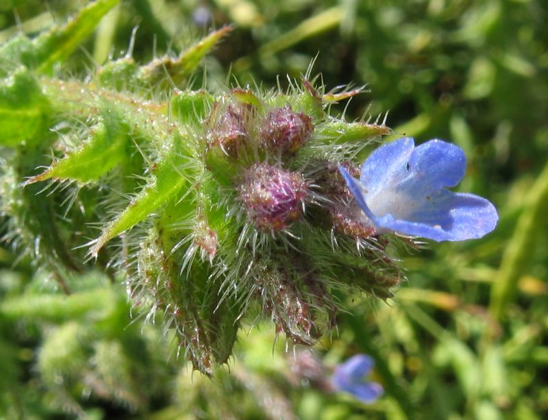 Ackerochsenzunge (Anchusa arvensis) in den Warnow-Wiesen